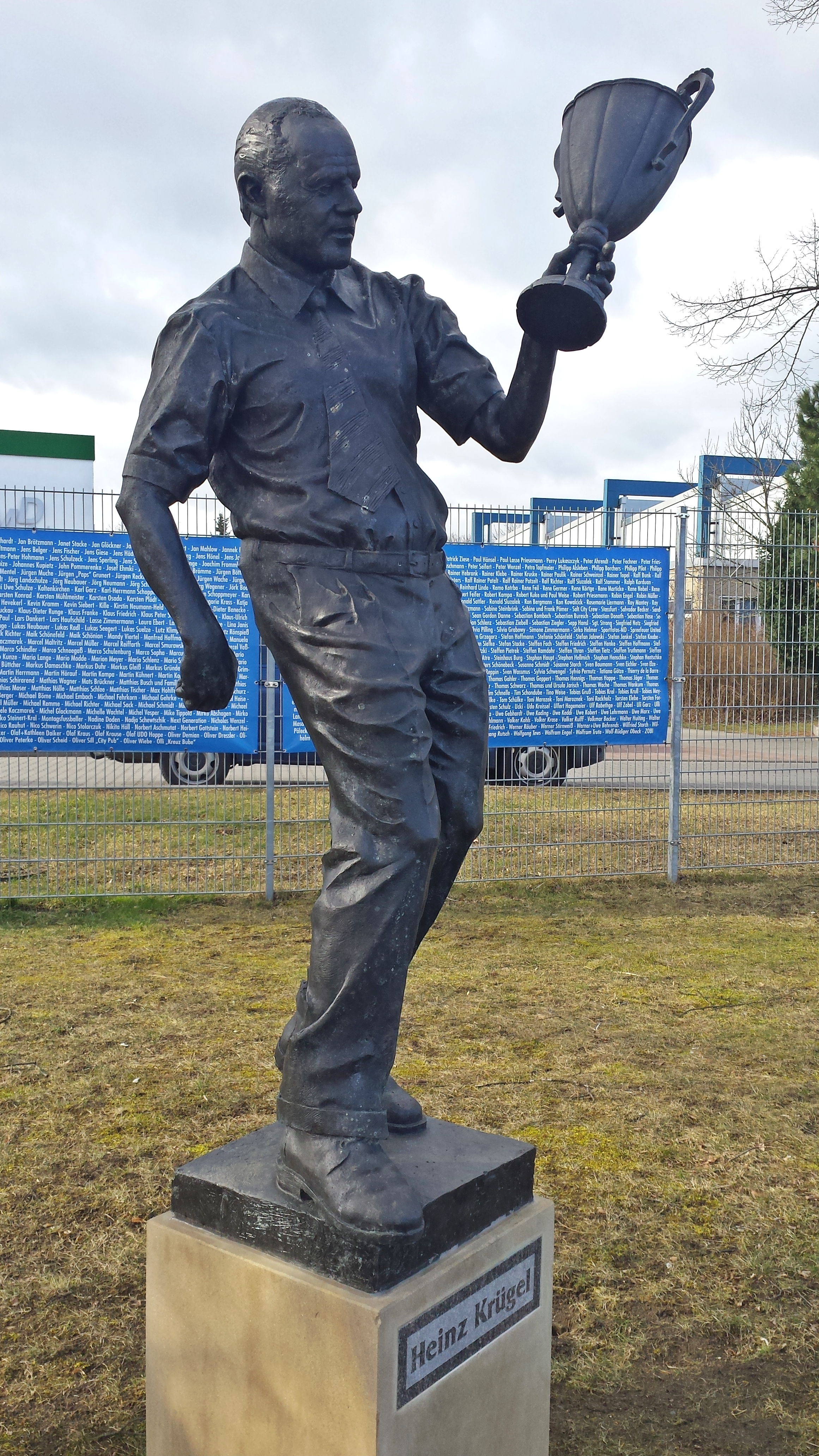 Denkmal für Heinz Krügel an der MDCC-Arena